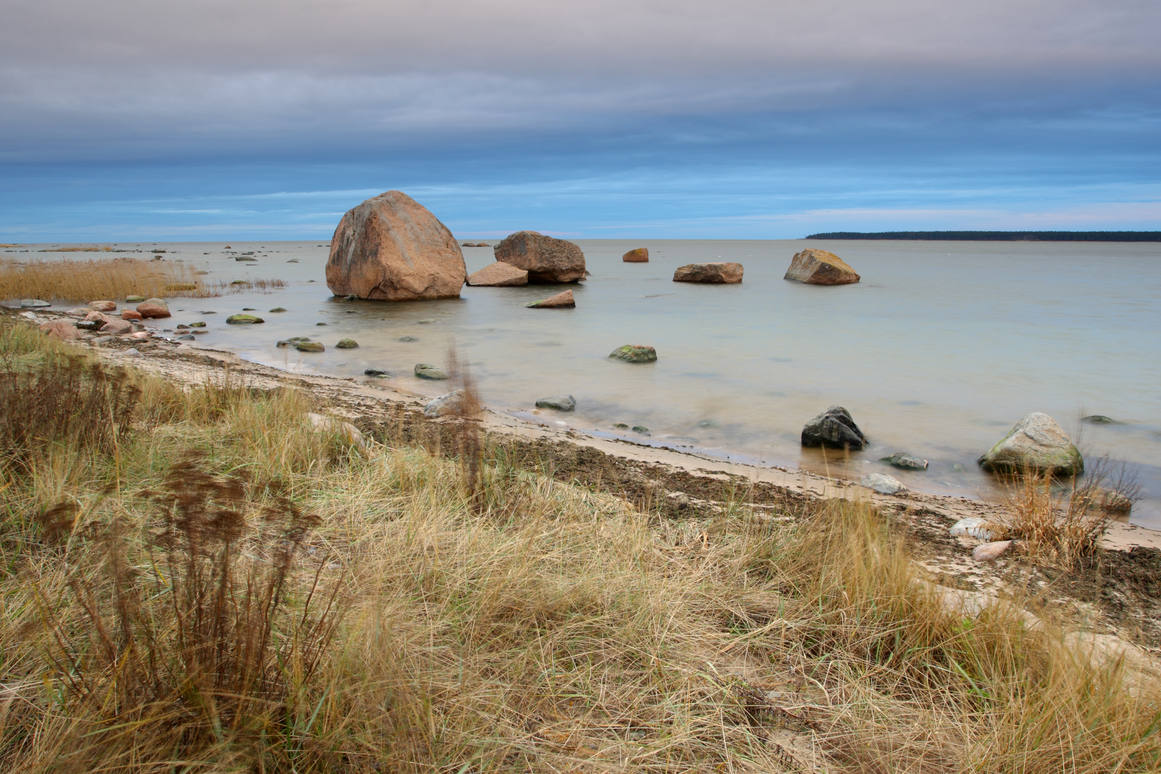 Lahemaa rahvuspargi rannik, Vana-Jüri rändrahn. Sombuselt hall ilm muutus loojangu eel värvikaks. Peakohal olev taevas oli hall, kuid mere kohal muutus taevas müstiliselt siniseks.